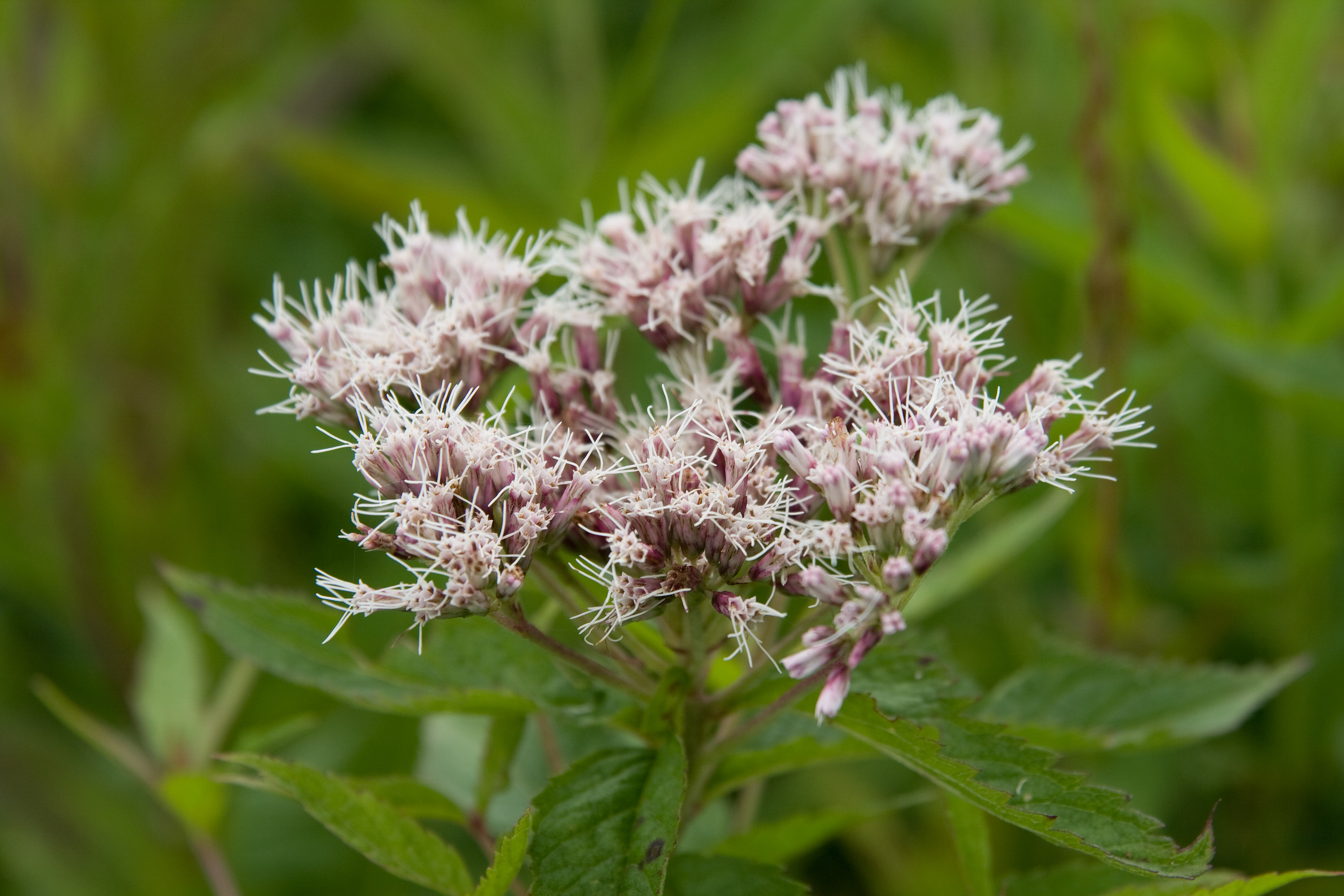 ヨツバヒヨドリ (学名:Eupatorium chinense var. sachalinense)